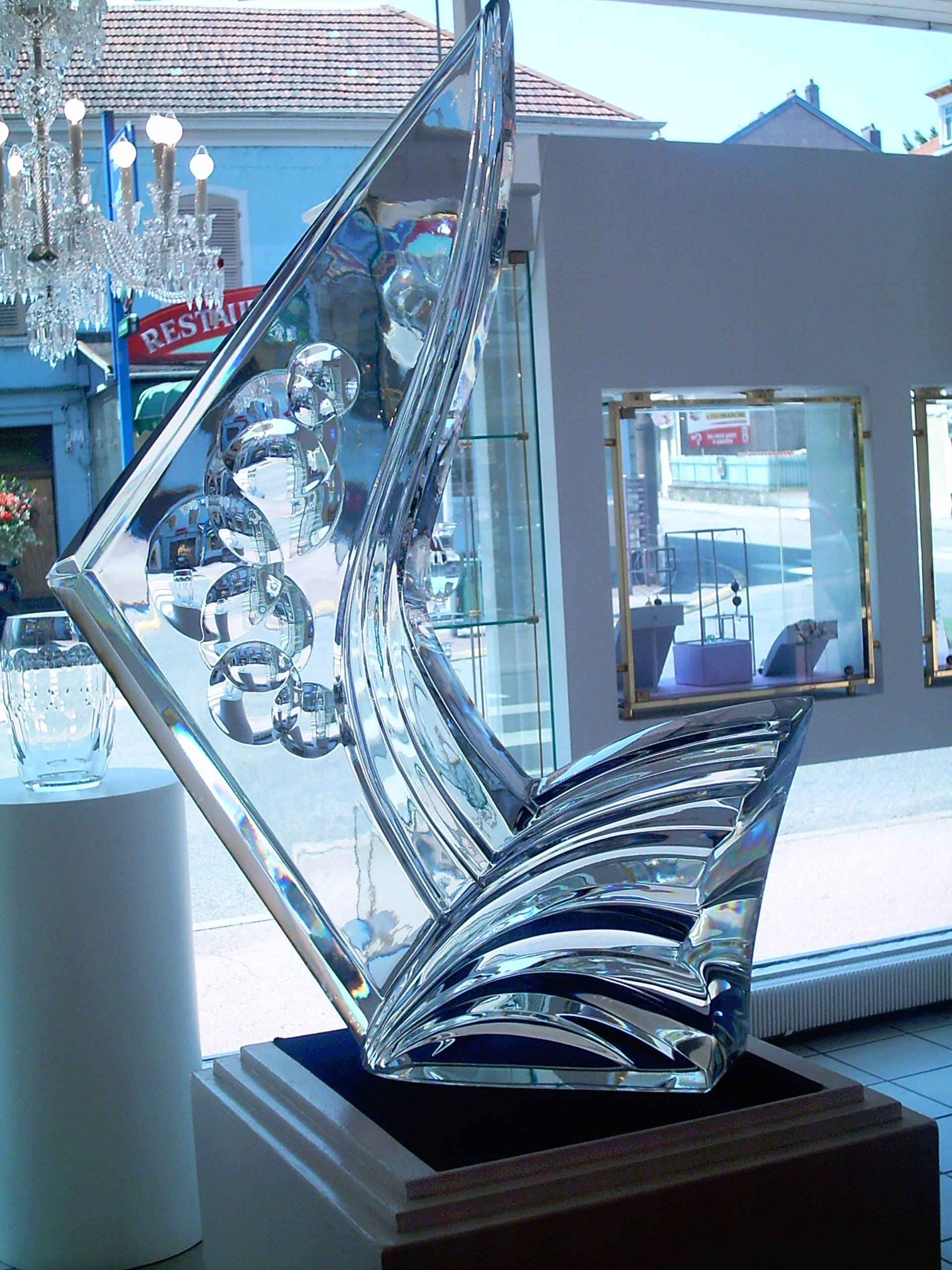 Sculpture en cristal Baccarat/France